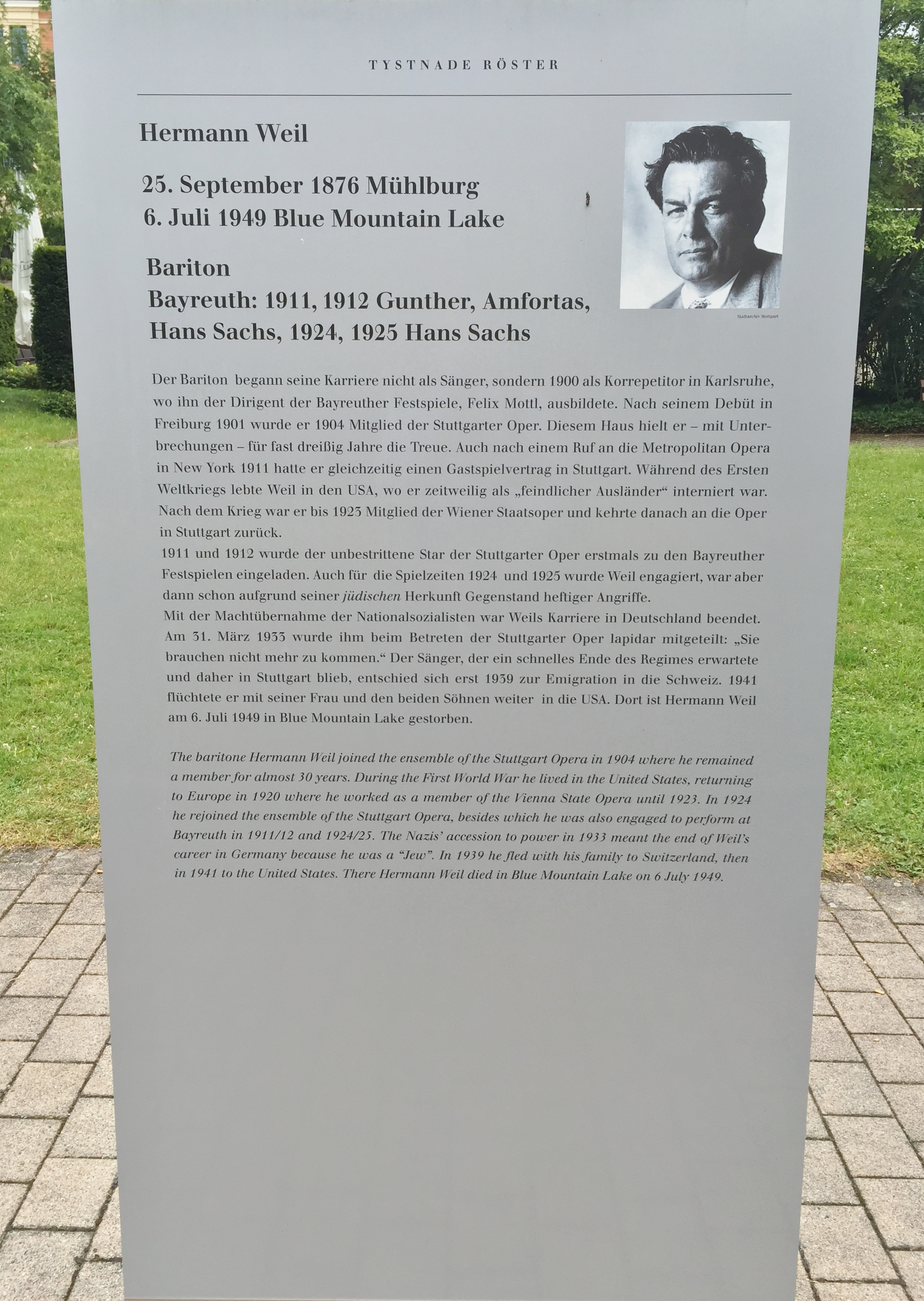 "Verstummte Stimmen - Die Bayreuther Festspiele und die 'Juden' 1876 bis 1945", Ausstellung 2016